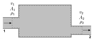 Wet van Castelli